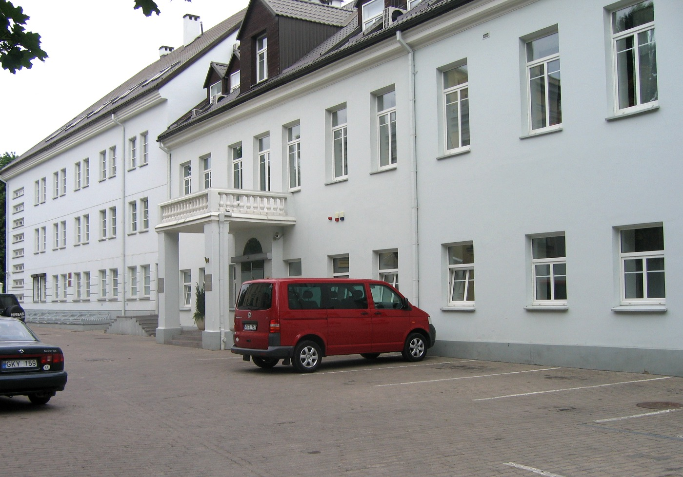 Autoriaus nuotrauka. 2006.06.29. Parex bankas. Klientų aptarnavimo skyrius, K. Kalinausko 13